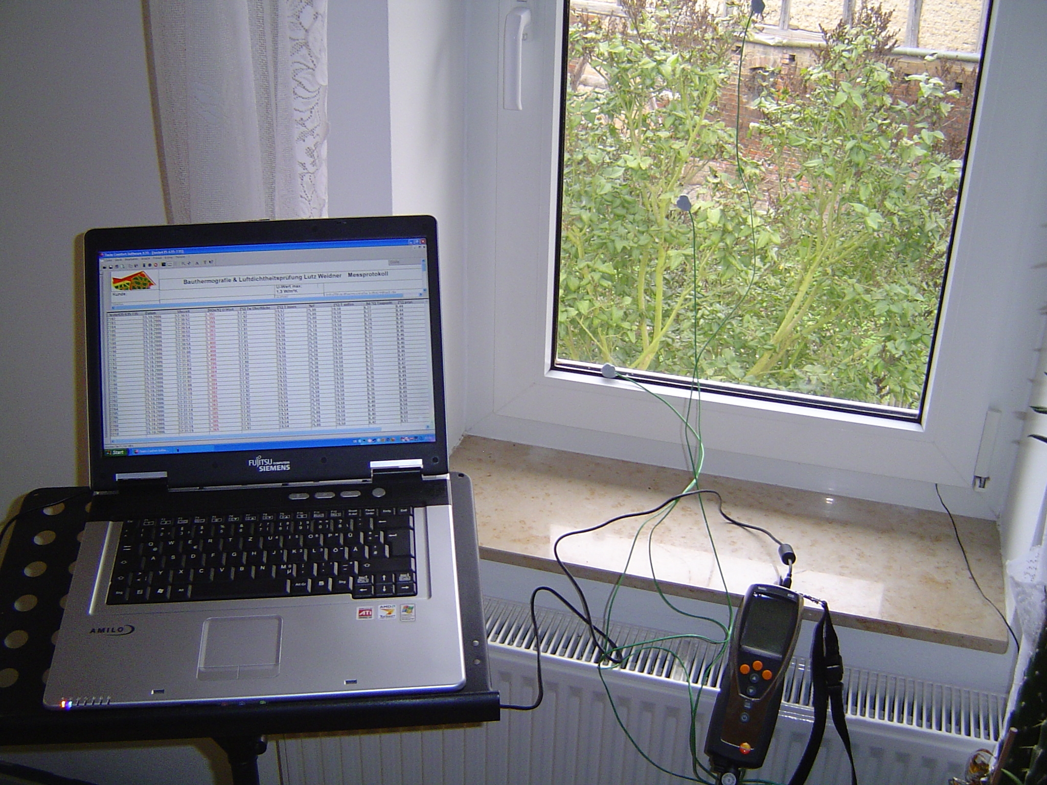 U-Wert Messung eines Fensters